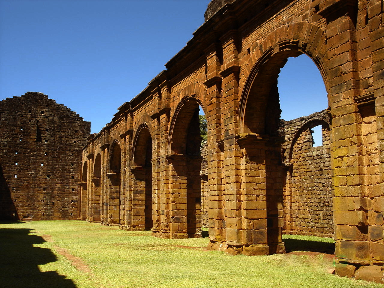 MARCO DA PRESENÇA JESUITA NO BRASIL - SUAS ARCADAS DE INSPIRAÇÃO ROMANA E COLUNAS CORÍNTIAS SÃO DATADAS DE 1735.